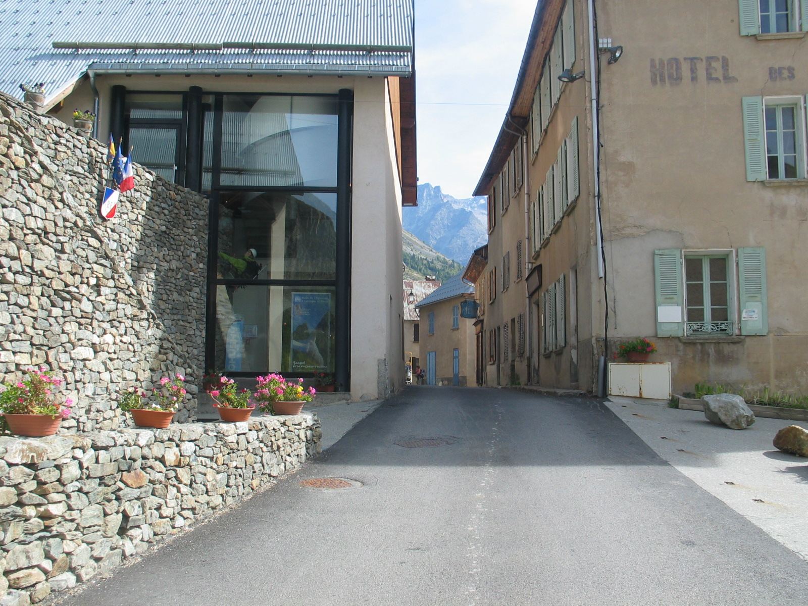 Musée Mémoires d'Alpinismes, à Saint-Christophe-en-Oisans (France).